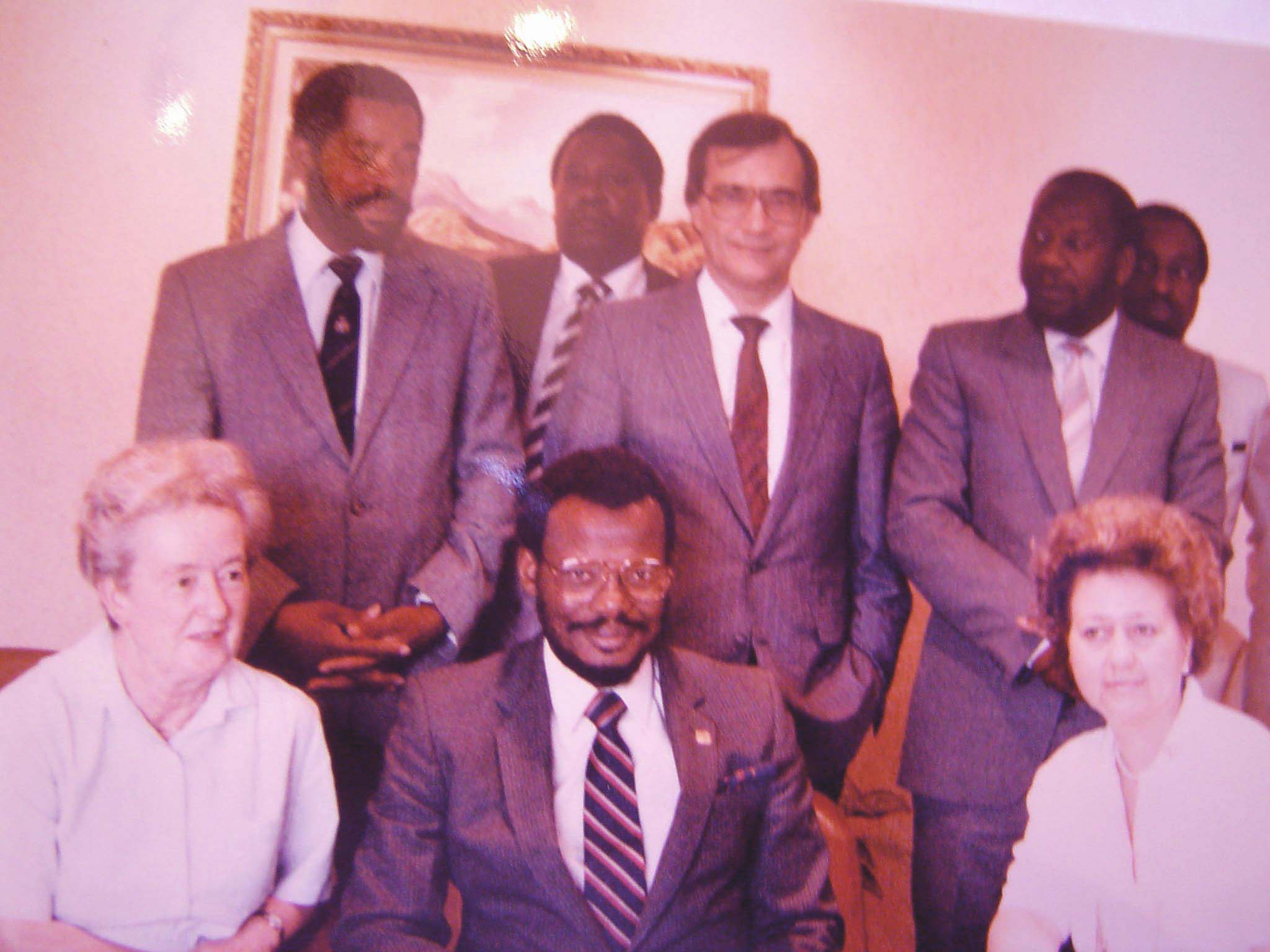 De Manghutsu (an der Mëtt) empfängt Memberen vum Europaparlament.